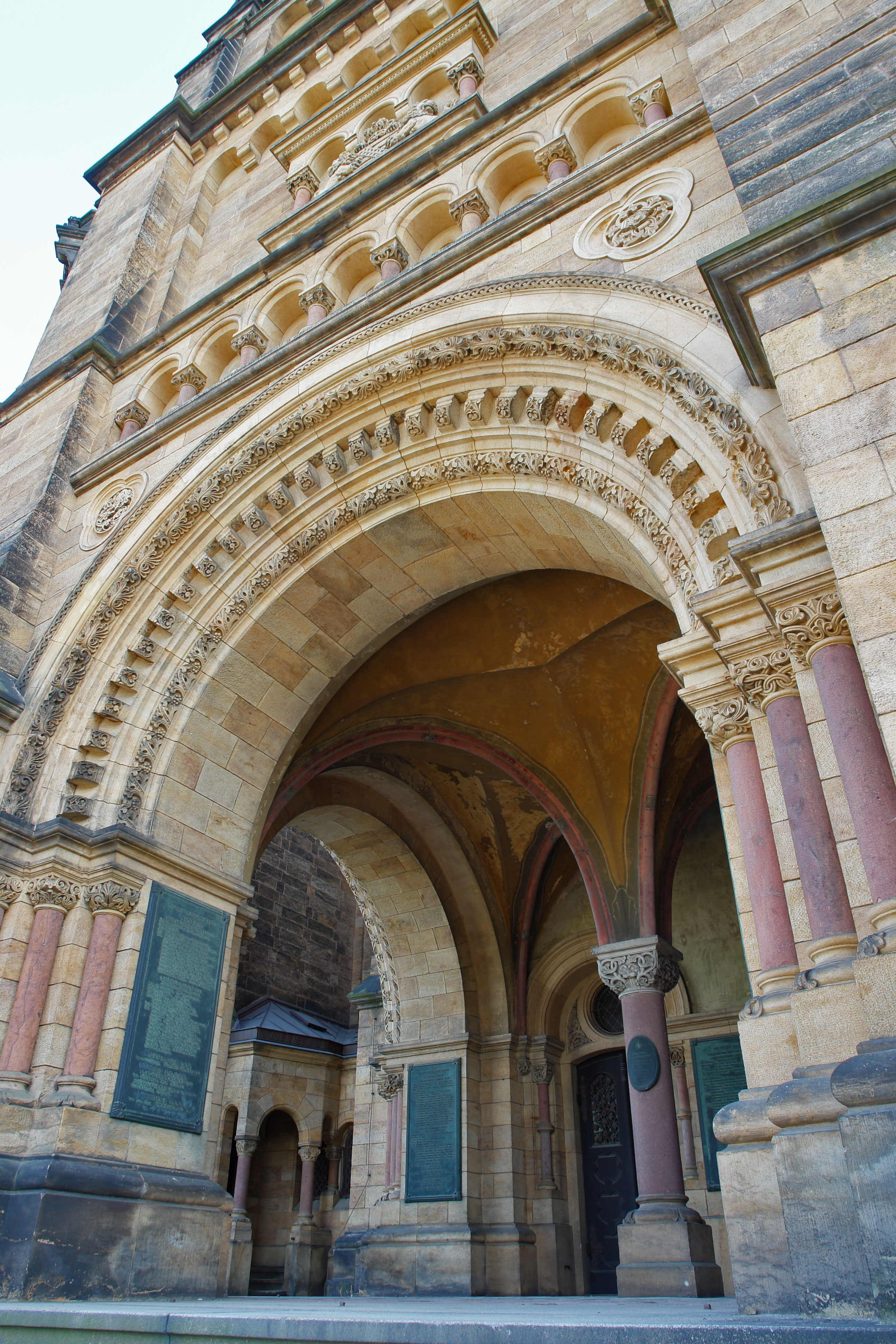 Garnisonkirche St. Martin, Torbogen unterhalb des Turms